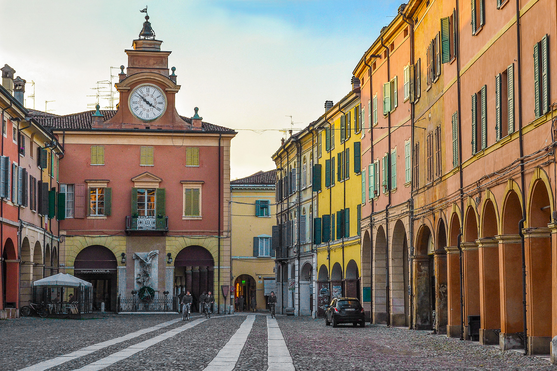 Corso Mazzini, Correggio (RE)